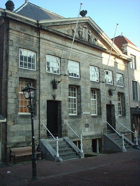 De Koornbeurs (voormalig de Vleeshal) te Delft stamt uit nl:1650